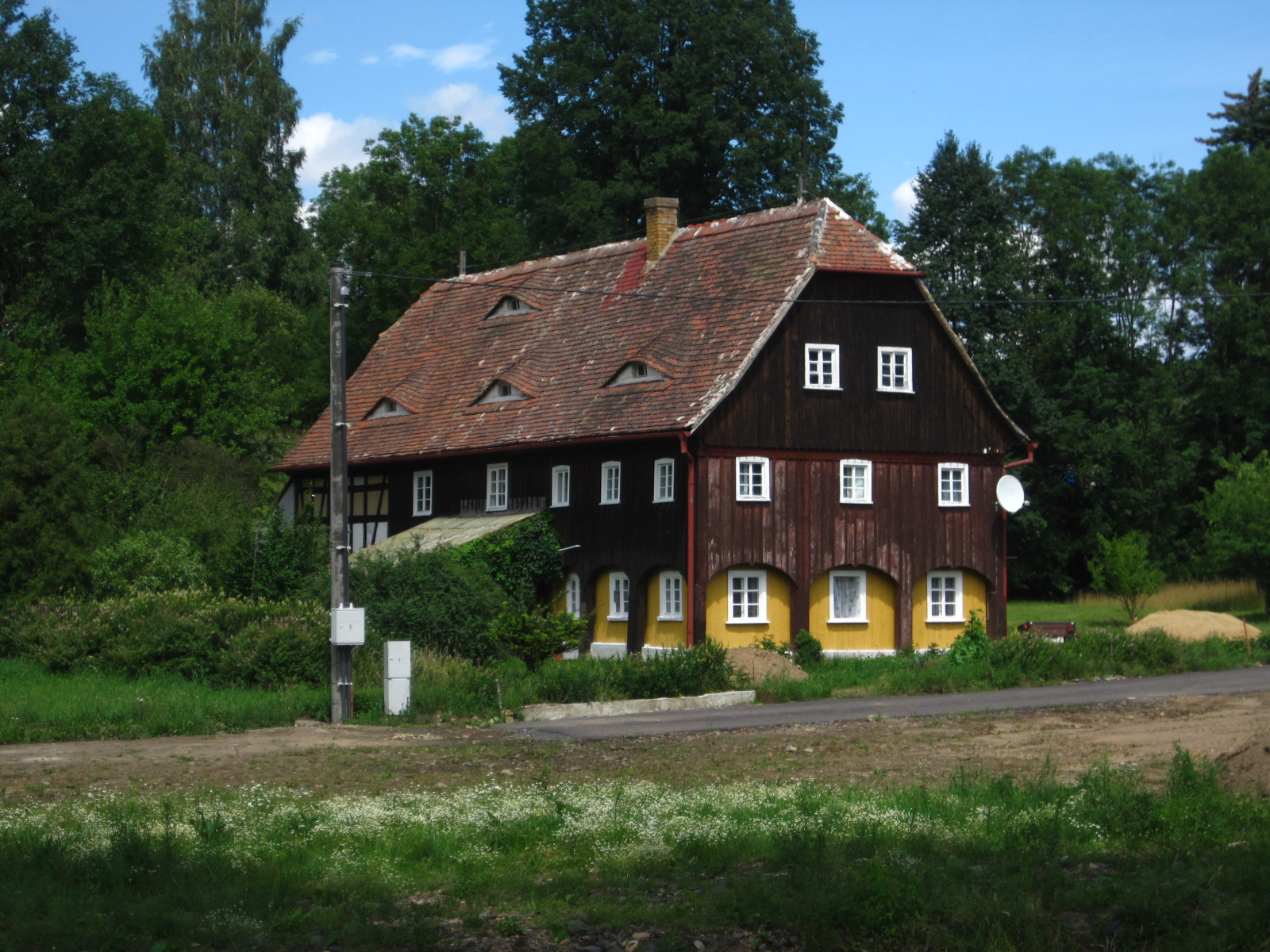 Dům čp. 77, Heřmanice 77, střed obce, Heřmanice (okres Liberec).